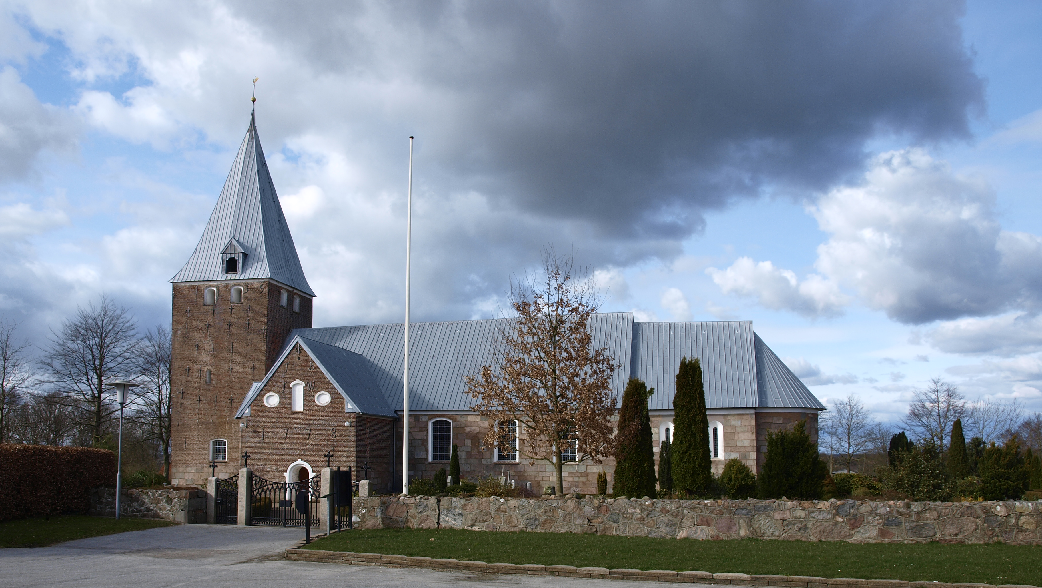 Nustrup Kirke, set fra sydsiden - 5. april 2015